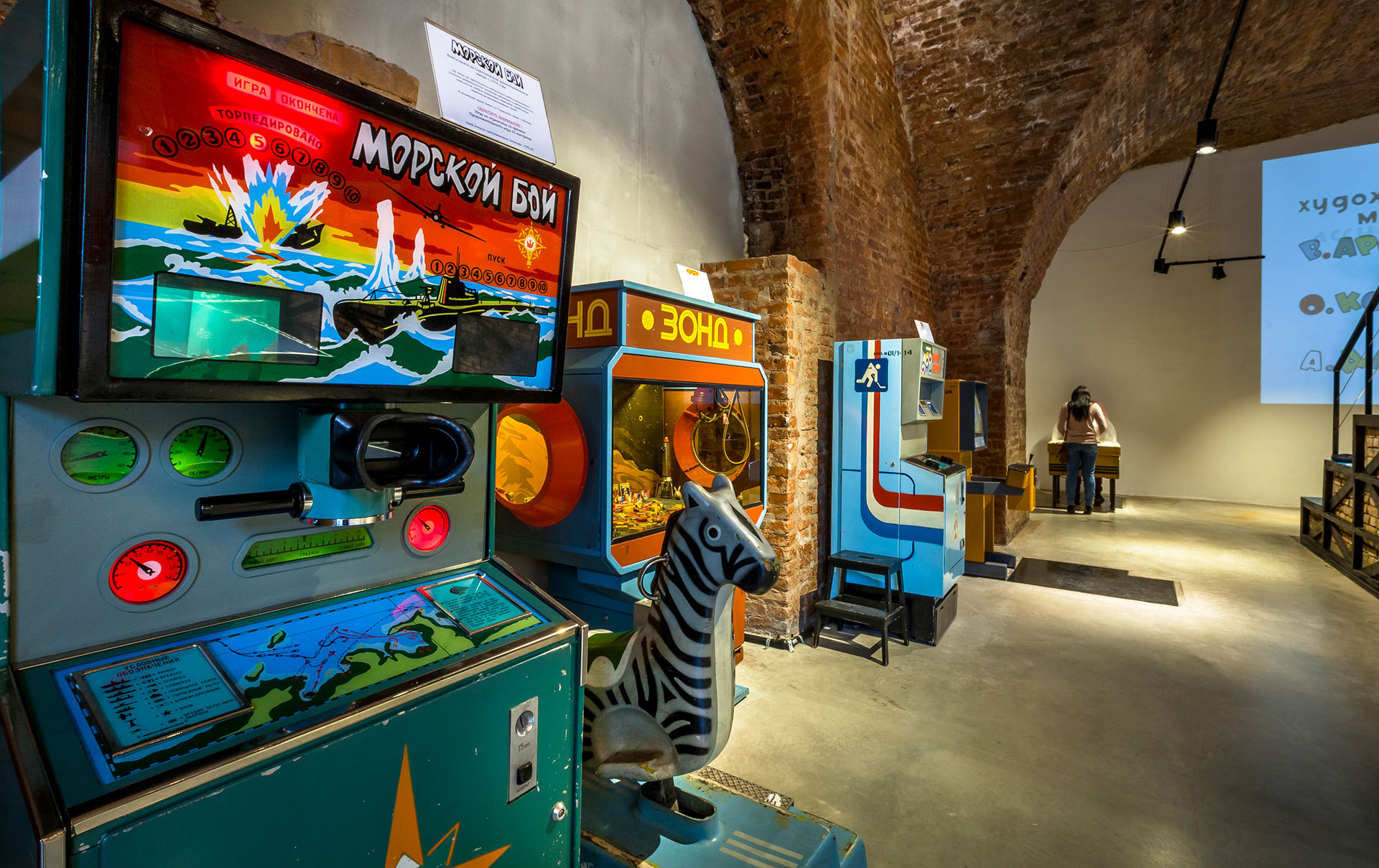 Музей советских игровых автоматов в Санкт-Петербурге. Игровой автомат «Морской бой» на переднем плане.